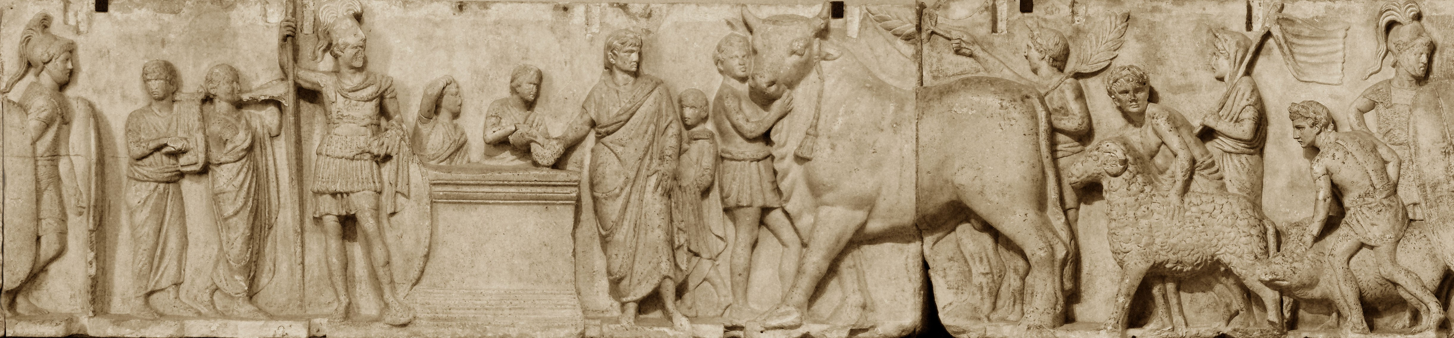 Relief from the altar of Domitius Ahenobarbus in the Louvre